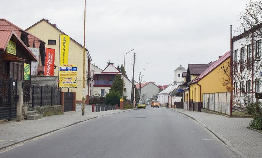 Ulica Bodzentyńska w Iłży